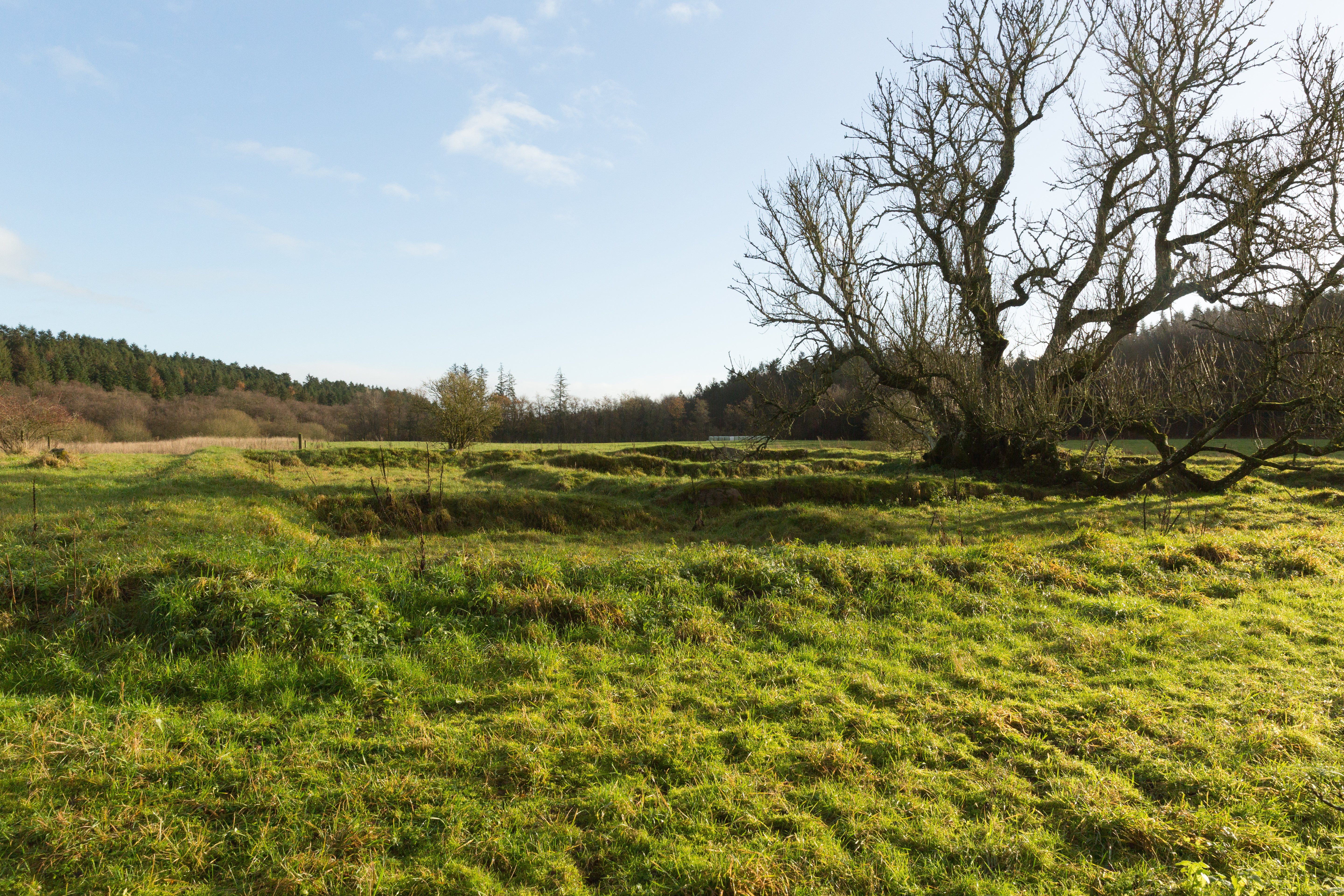 Alling Kloster